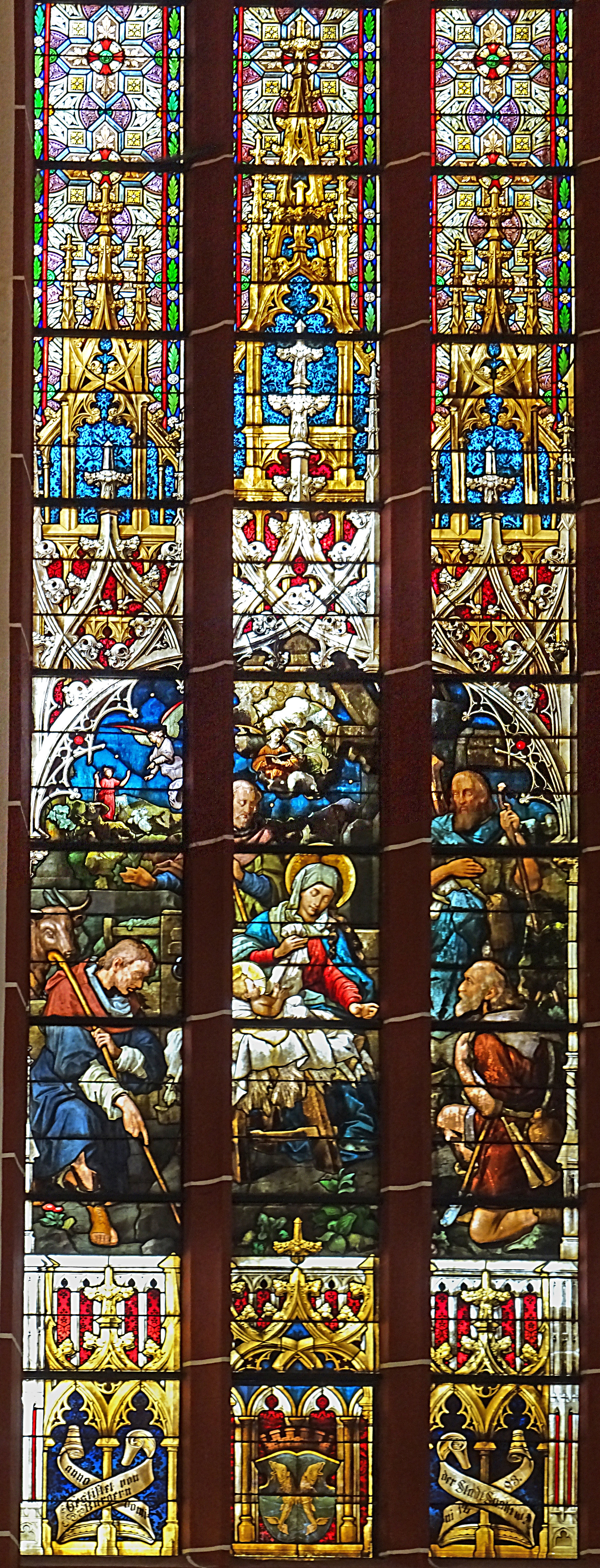 linkes Chorfenster - Weihnachten - in der Johanneskirche Saalfeld